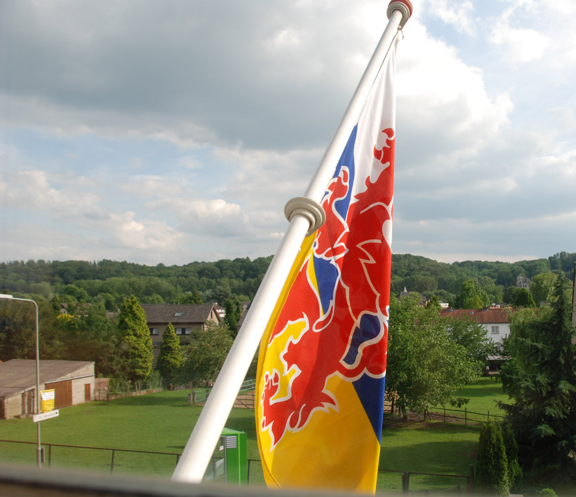 Limburgs: Vlag van Nederlands Limburg.